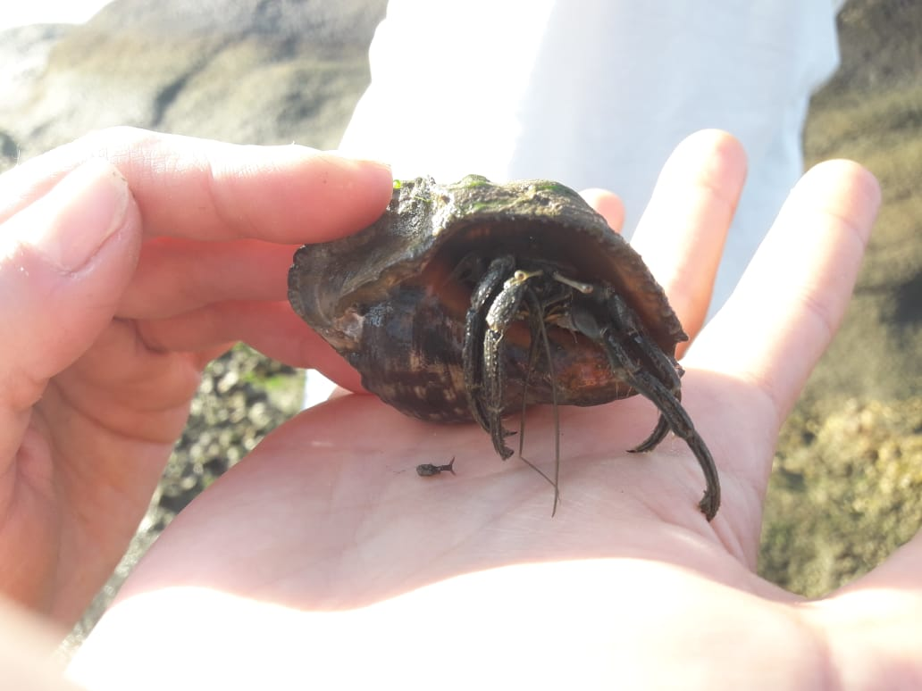 Foto de um ermitão representante da classe malacostraca de crustáceos encontrado na Praia do araçá em São Sebastião SP, Brasil. Este é um decapode e se encontra dentro da concha de um molusco.